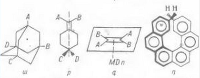 Քիրիլային տարրերով մոլեկուլներ